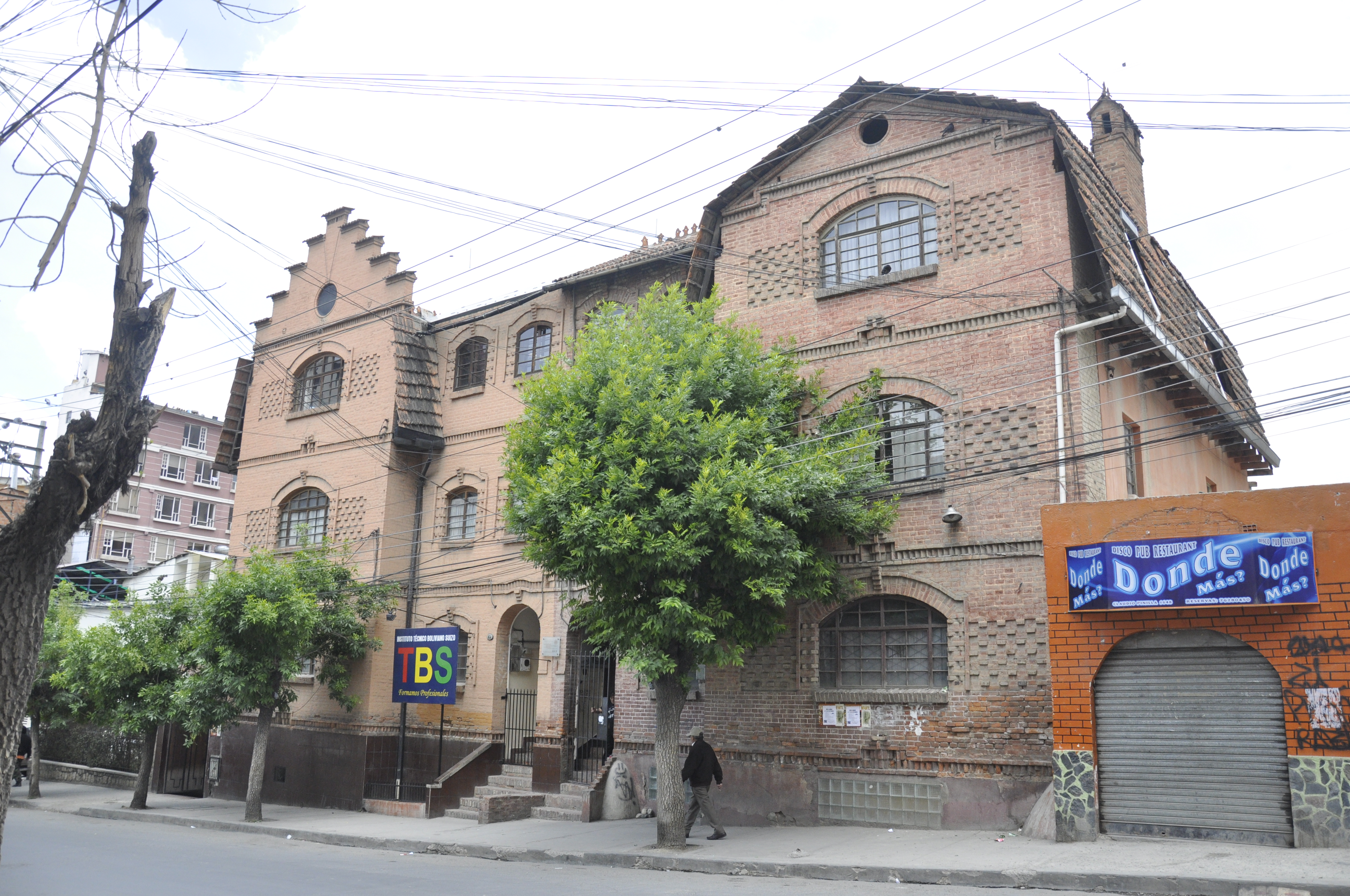 Casa Posnansky This medium shows the protected monument with the number L/00-106 in Bolivia.